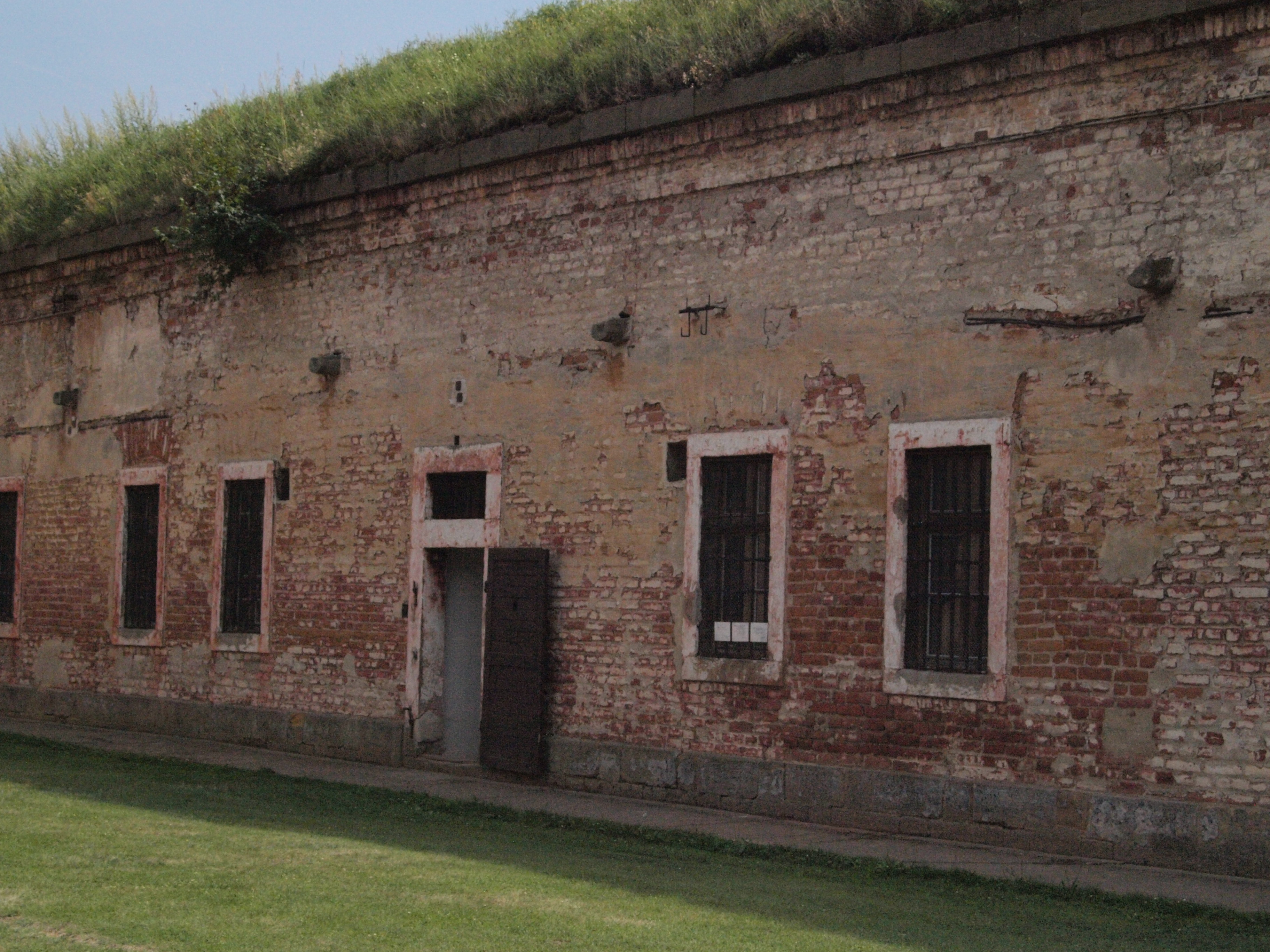 Vchod k celám č. 18, 19, 20 v Malé pevnosti Terezín